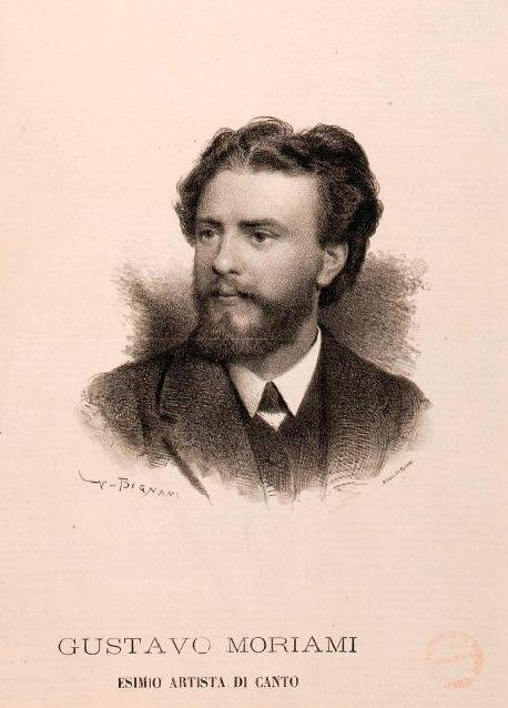 Gustavo Moriami (1842-1915)